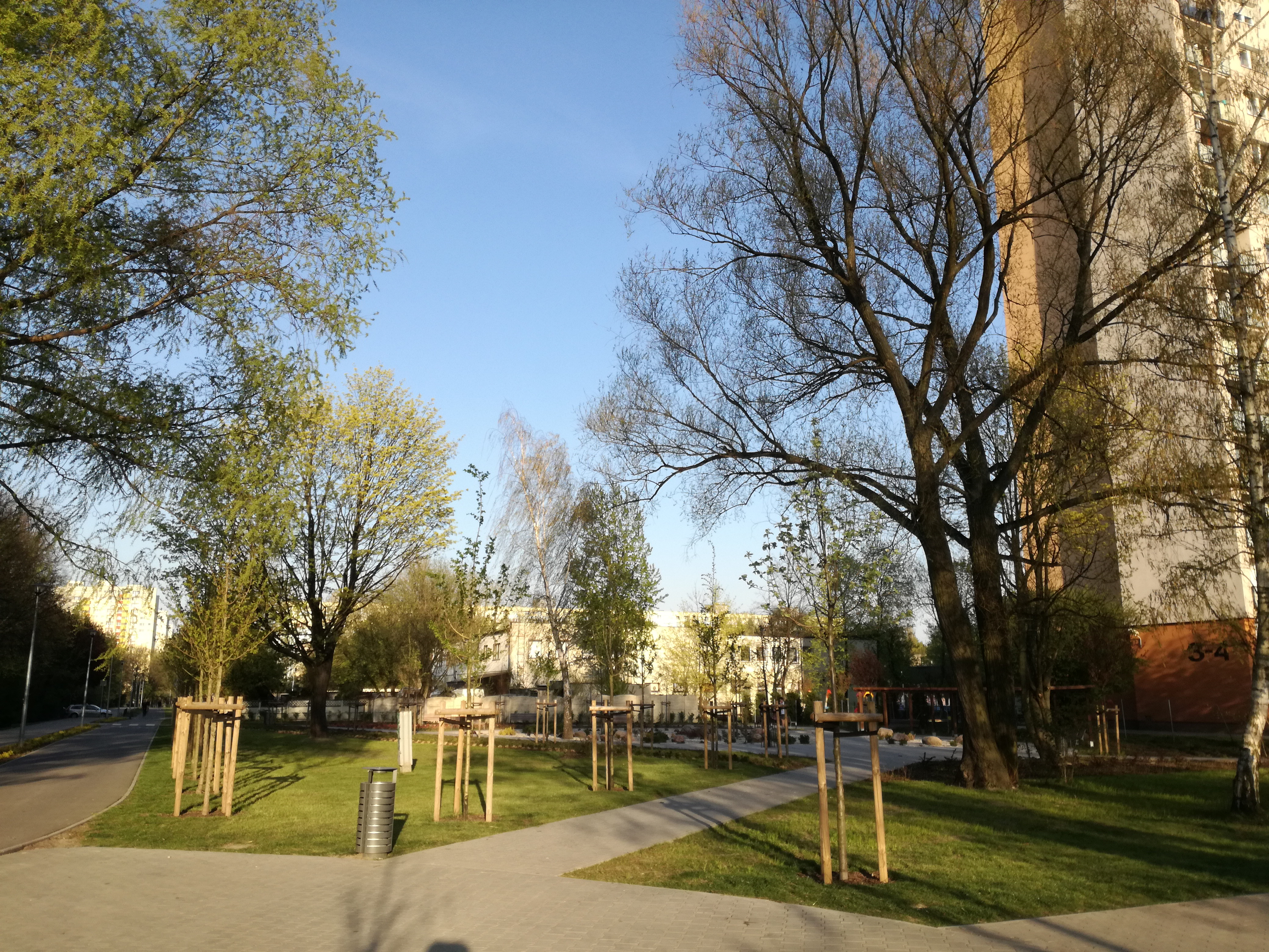 Park Rataje w Poznaniu na osiedlu Rzeczypospolitej.